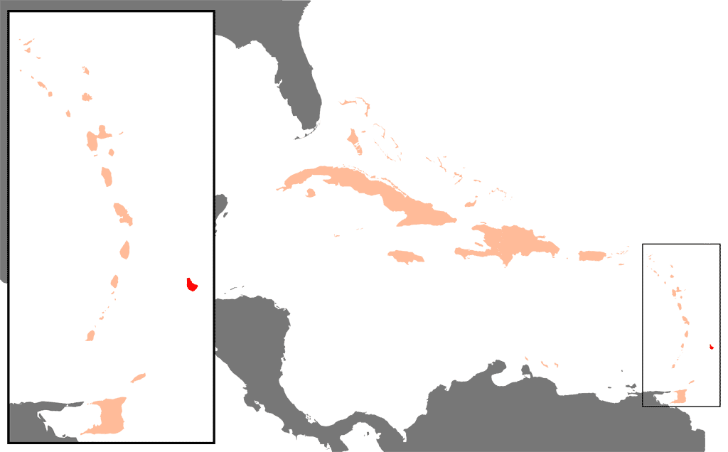 Lage der Insel Barbados in der Karibik